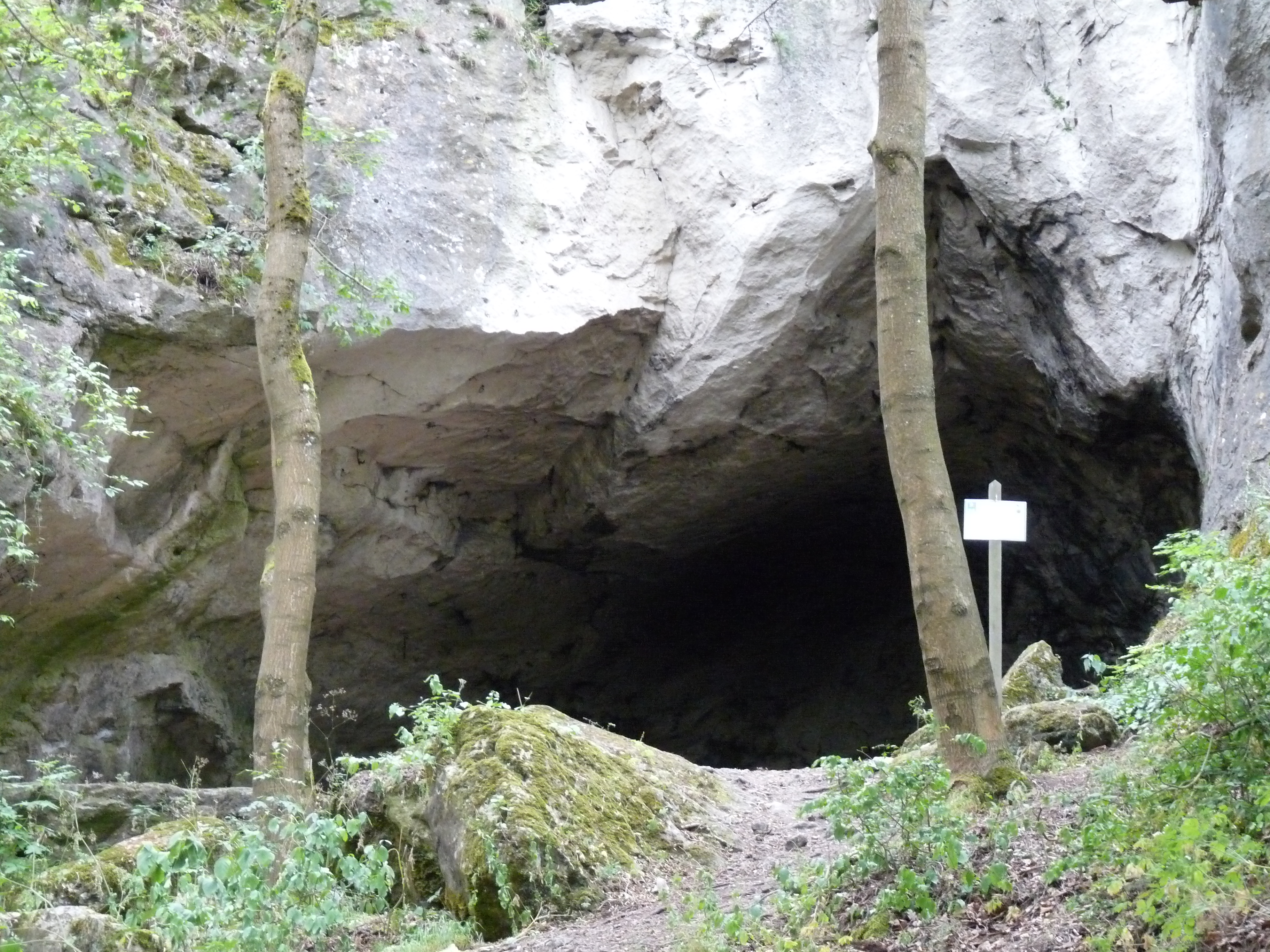 Jaskyňa pod vrcholom Veľkej pece